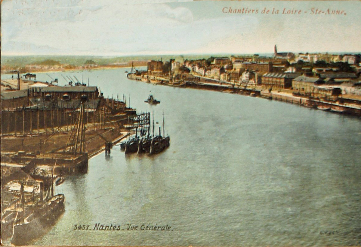 image des chantiers de la Loire issue d'une carte postale du début du XXe siècle.